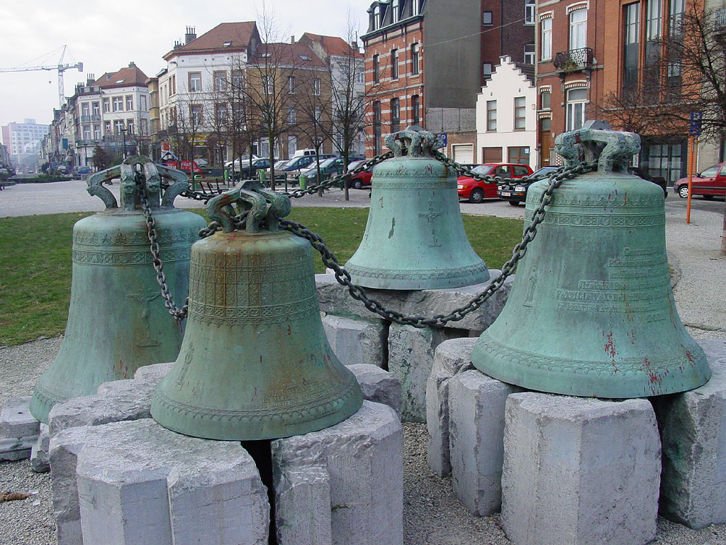 2004-2005 David R Edgar - Etterbeek (Bruxelles), Les cloches de l'ancienne église Sainte Gertrude, détruite parceque risquant de s'éfondrer.